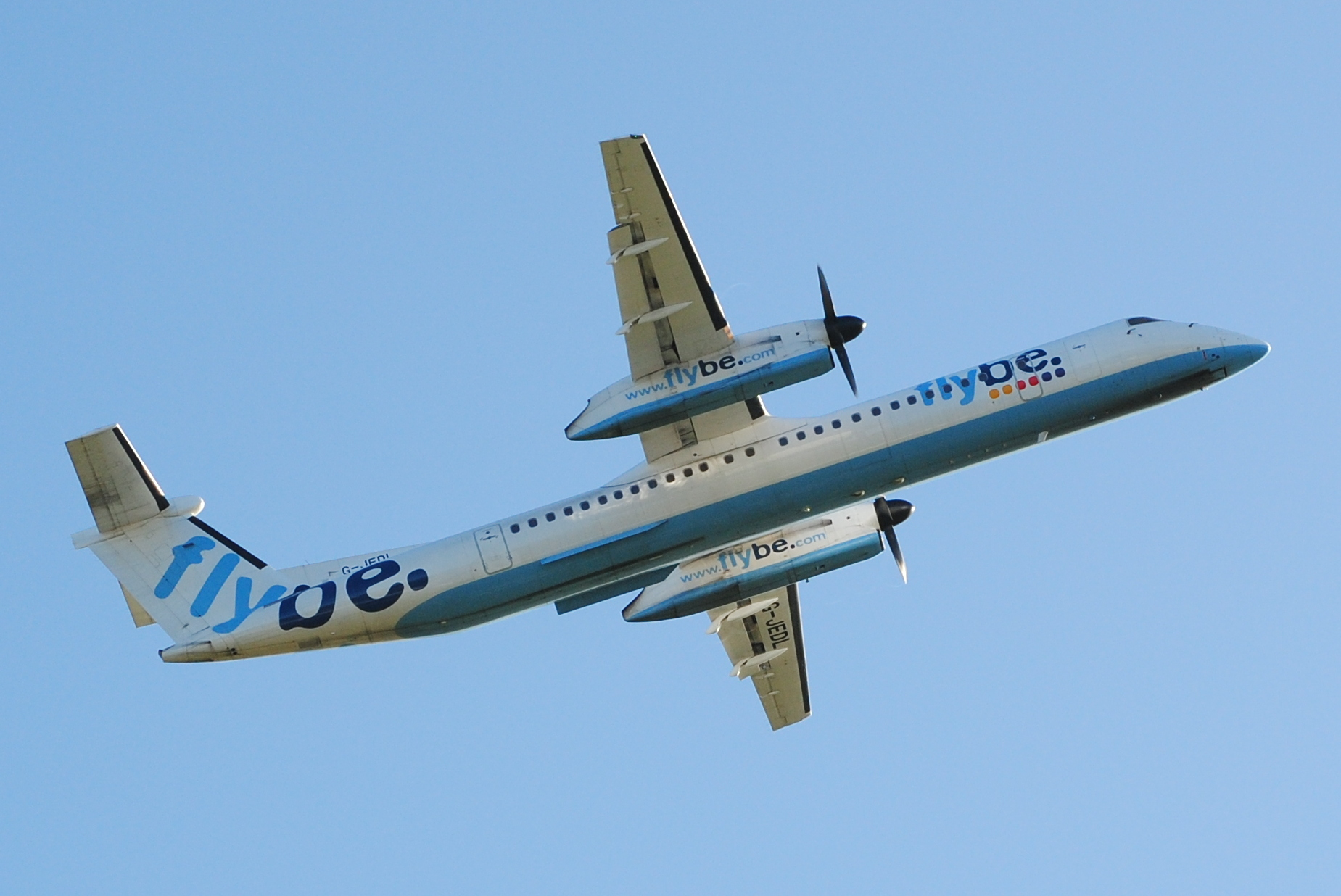 G-JEDL